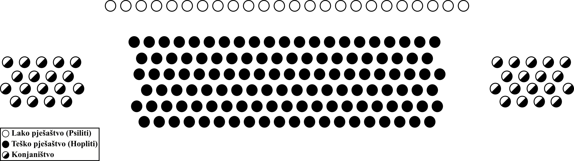 Grafički prikaz borbenog rasporeda grčke falange.